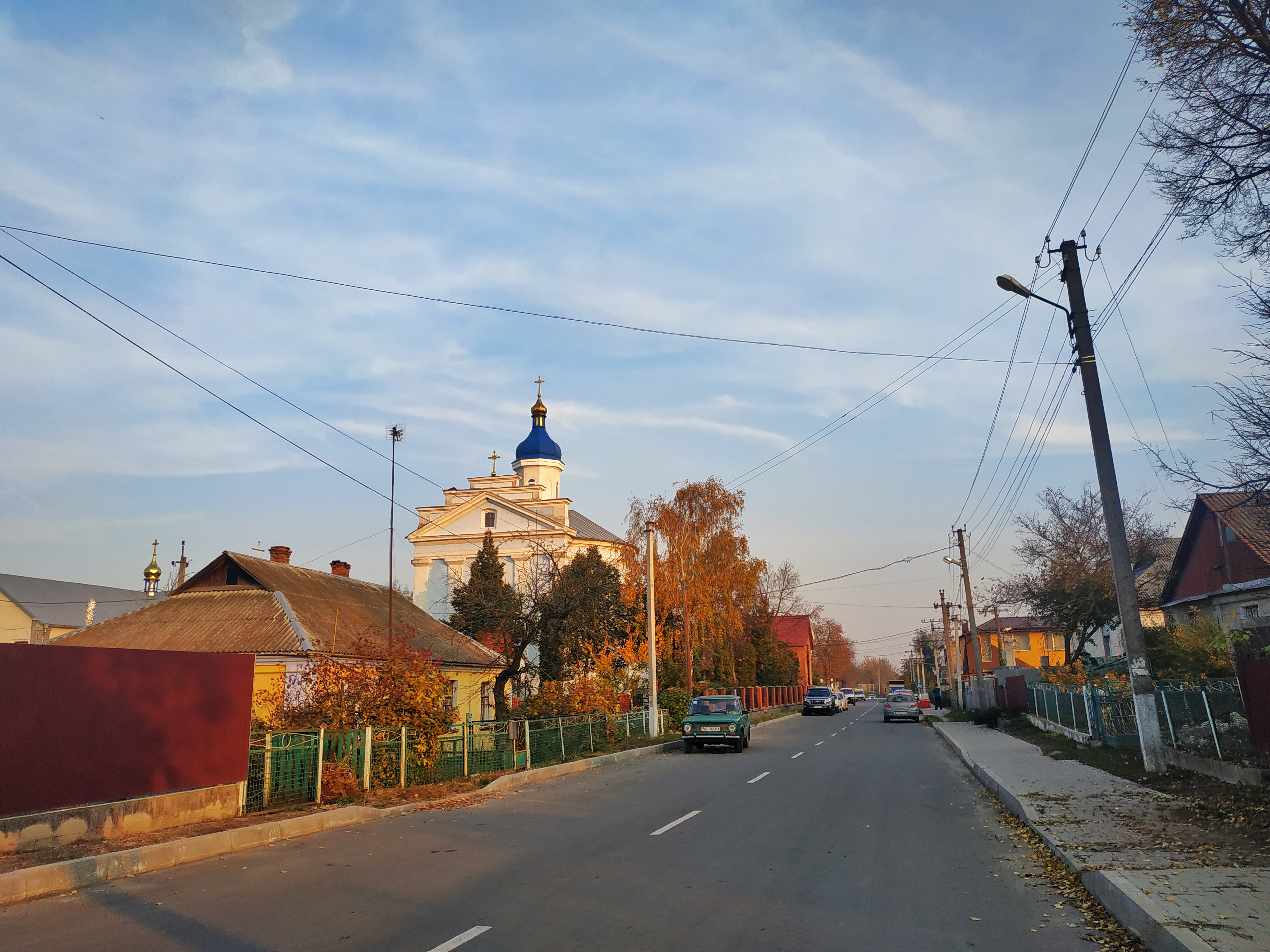 Чорний Острів, вулиця з видом на церкву Преображення Господнього